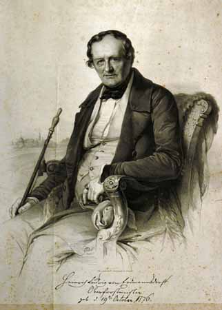 Heinrich Ludwig von Erdmannsdorf, Lithographie von Franz Seraph Hanfstaengl